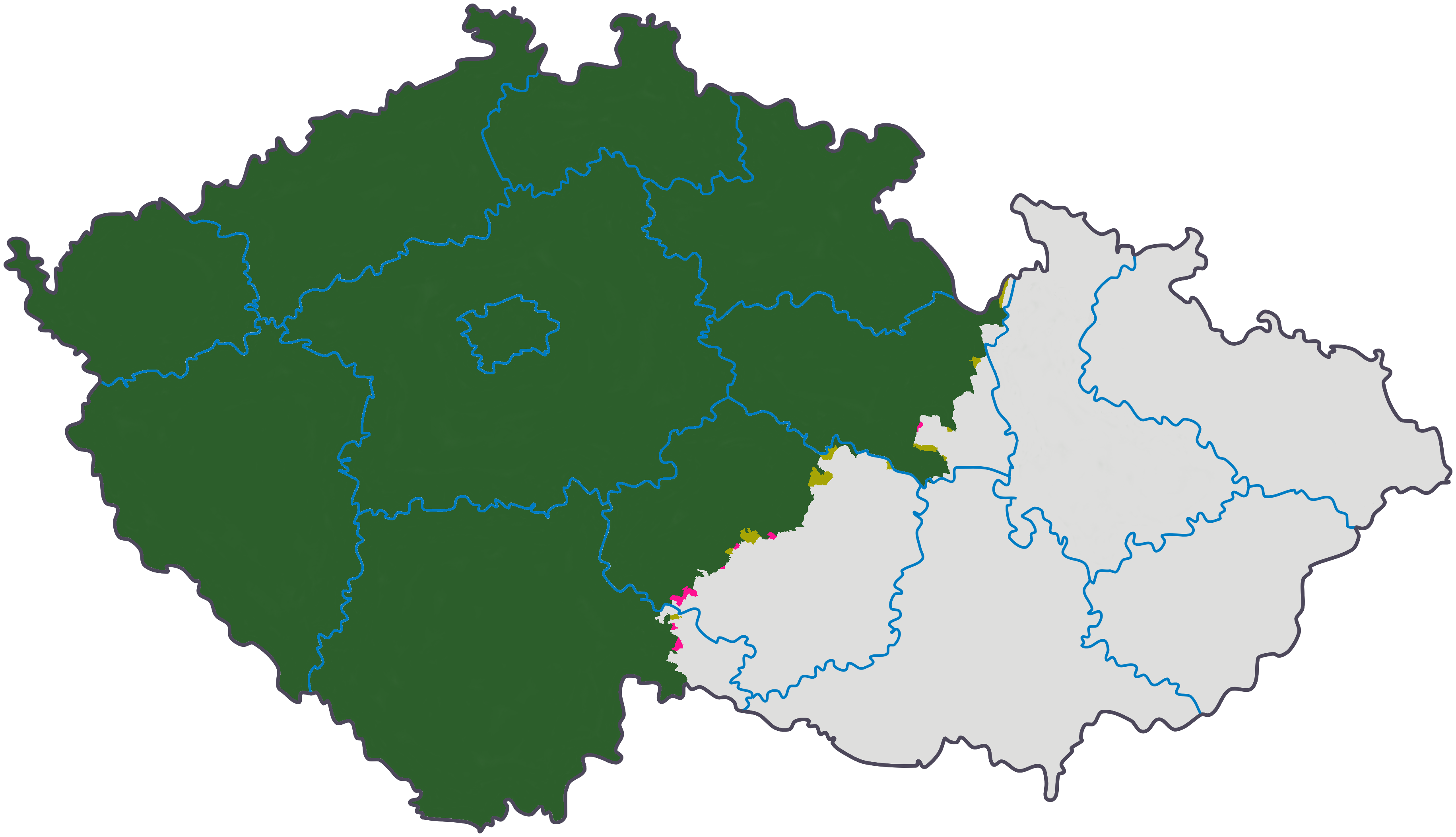 Zeleně a béžově je zakresleno území Čech Zeleně a růžově je zakresleno území České církevní provincie Béžově je zakresleno území Čech patřící k Moravské církevní provincii Růžově je zakresleno území Moravy patřící k České církevní provincii